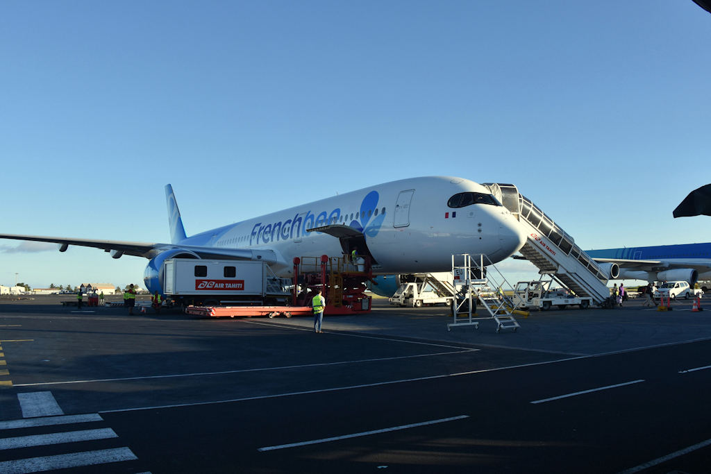 A350 French Bee sur l'aéroport de Papeete-Faaa le 29/10/2018